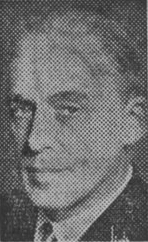 Per Persson